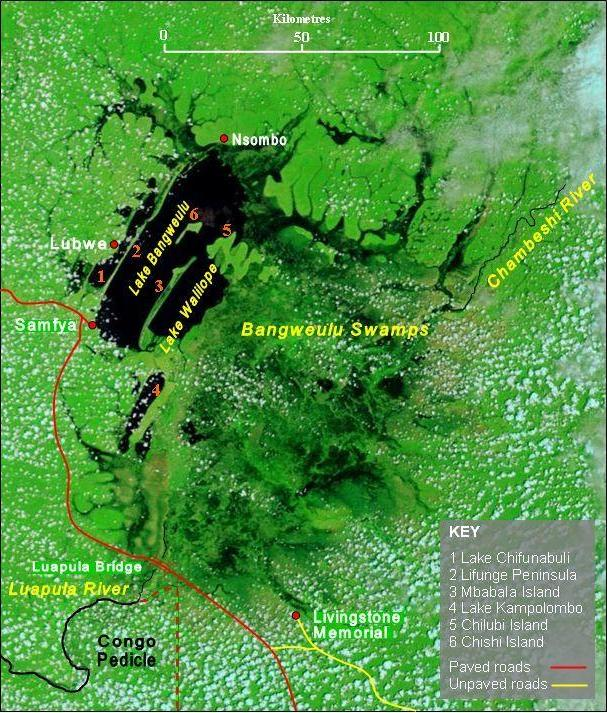 Lake Bangweulu and Bangweulu Swamps in flood, January 2003.